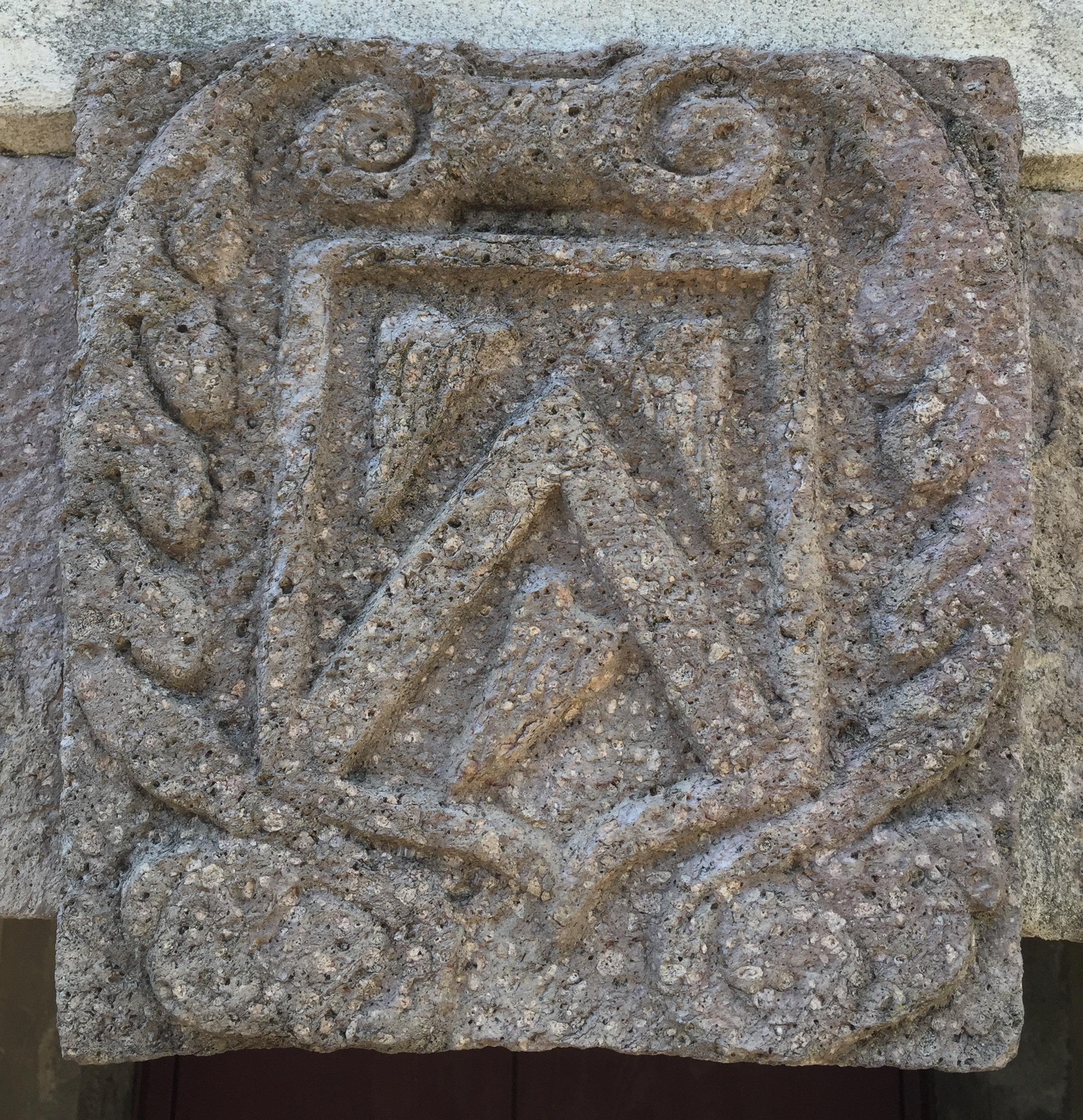 Stemma della famiglia Candì scolpito sul portale della cantina di Villa Buzzaccarini a Monselice.